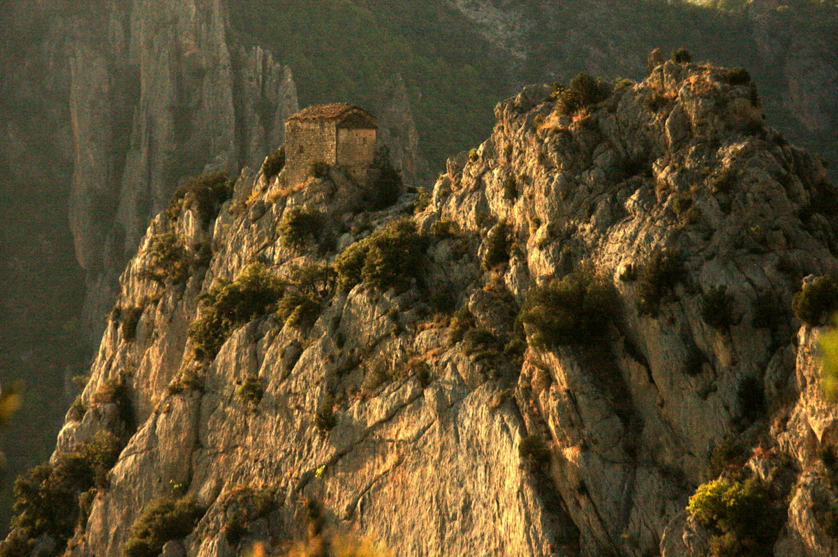 Ermita de la Mare de Déu de la Pertusa a Corçà (la Noguera-Catalunya)